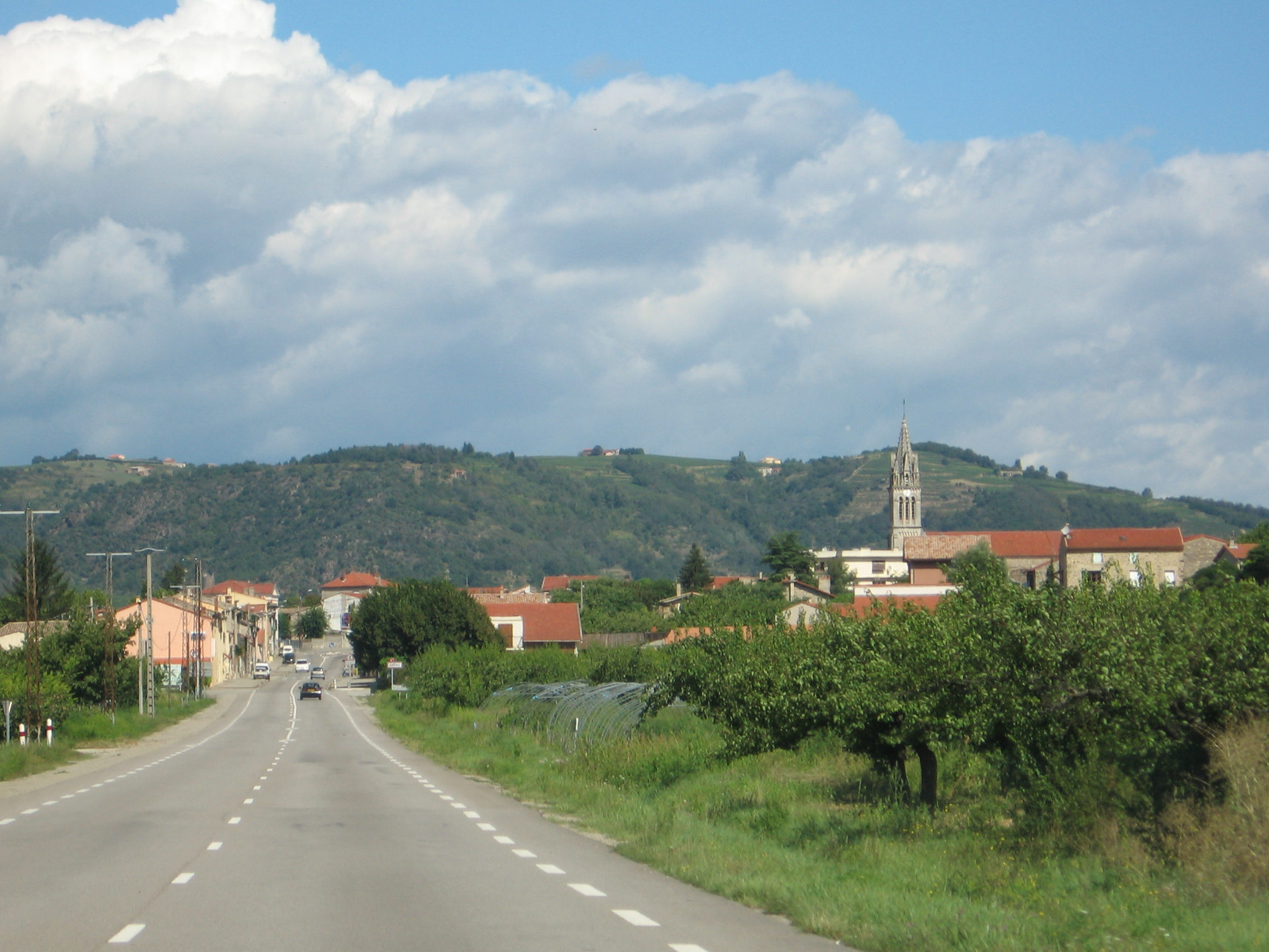 Érôme, France